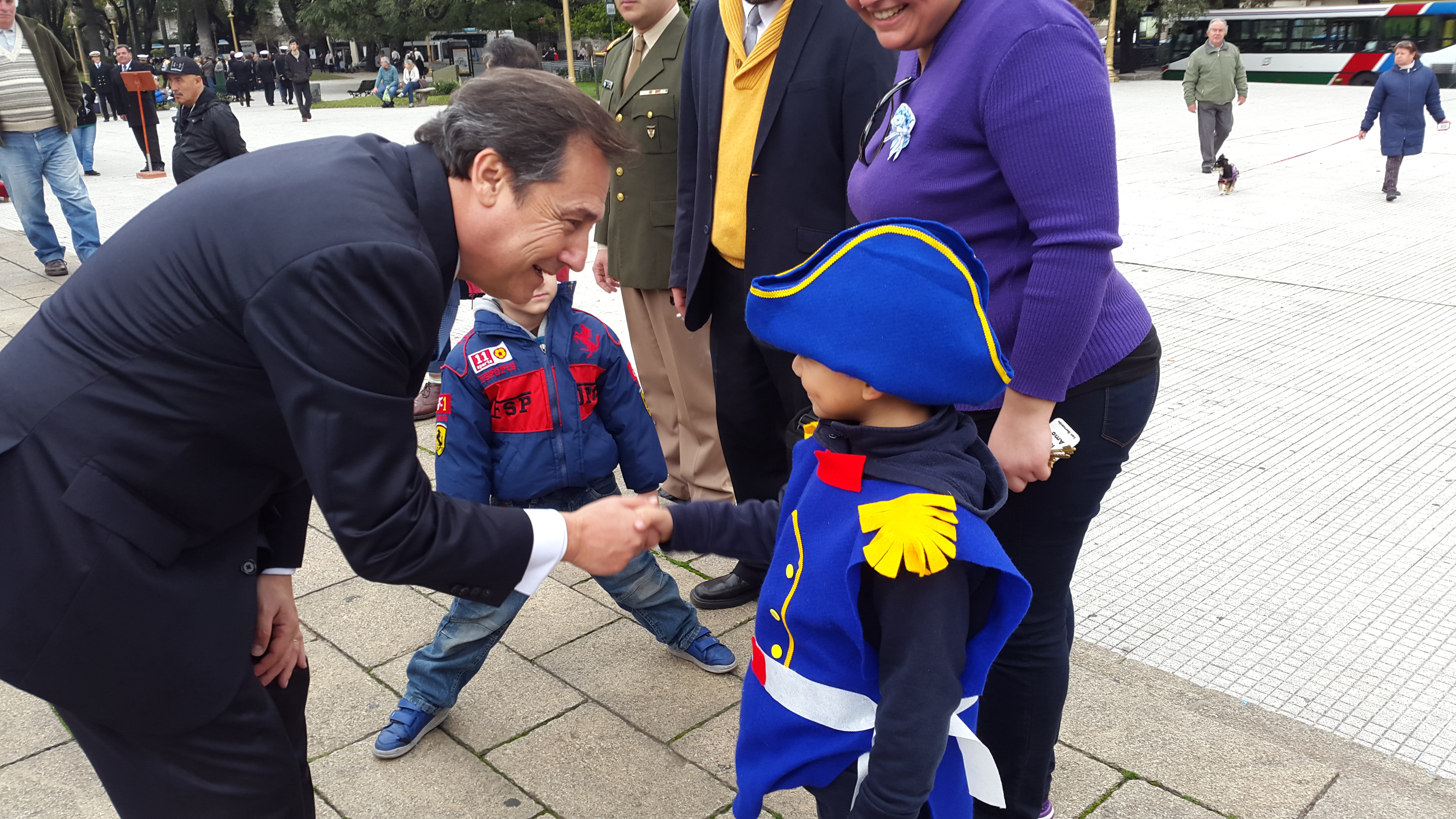 Eduardo García Caffi saluda a un niño vestido de San Martín en uno de los actos organizados desde el Instituto Nacional Sanmartiniano.